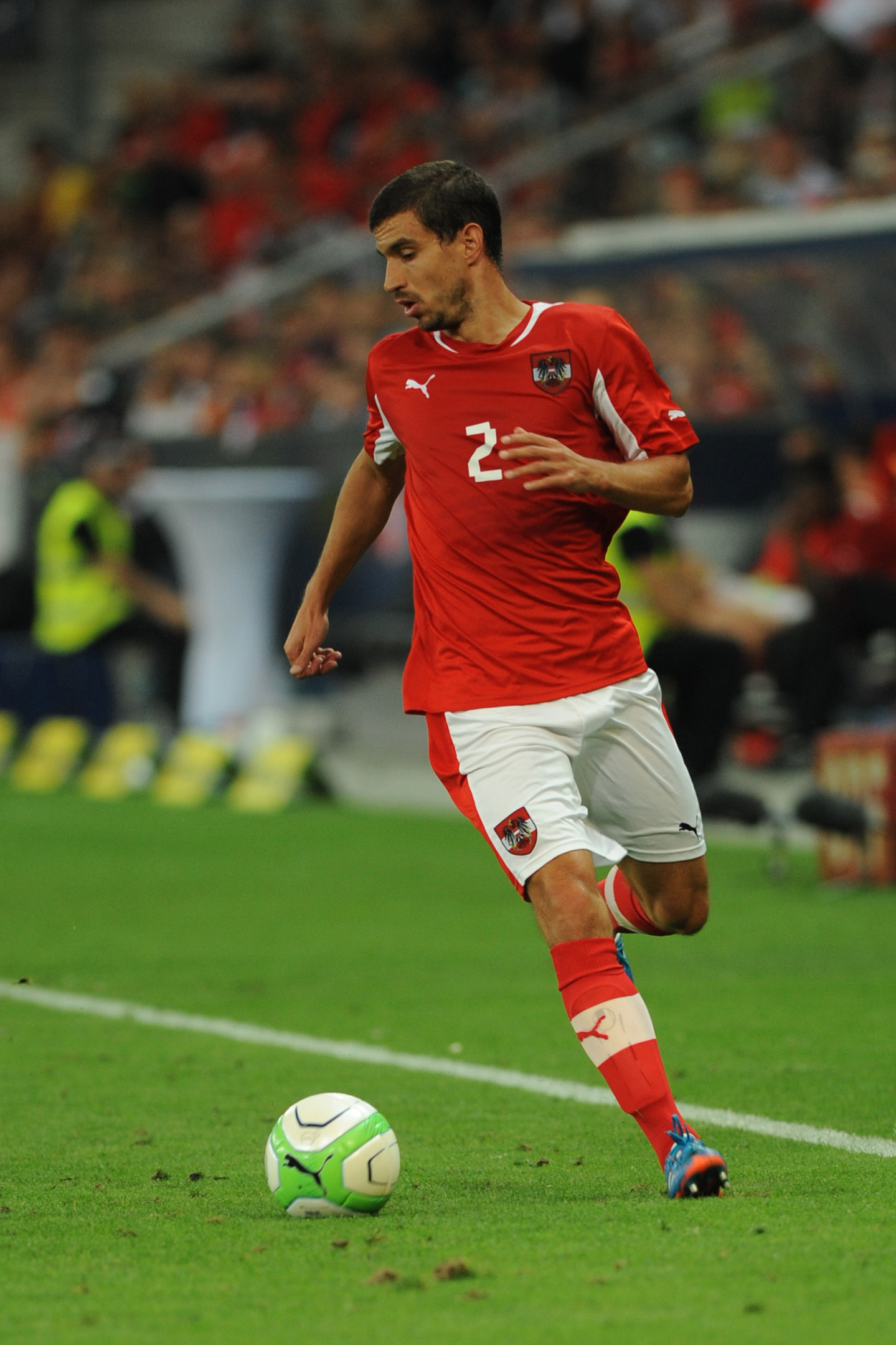 Freundschaftliches Länderspiel Österreich - Griechenland am 14. August 2013: György Garics